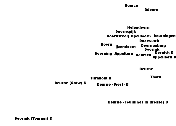 GNU Free Documentation License (eigen werk) Ter beperking van de corpus en voor de verschaffing van een historisch perspectief is deze kaart is gebaseerd op de kaarten van BLAEU. Het oorspronkelijke volledige artikel vindt u hier